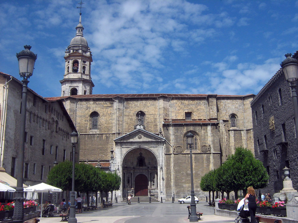 Iglesia de Santa María la Real en Azkoitia, Guizpuzcoa.